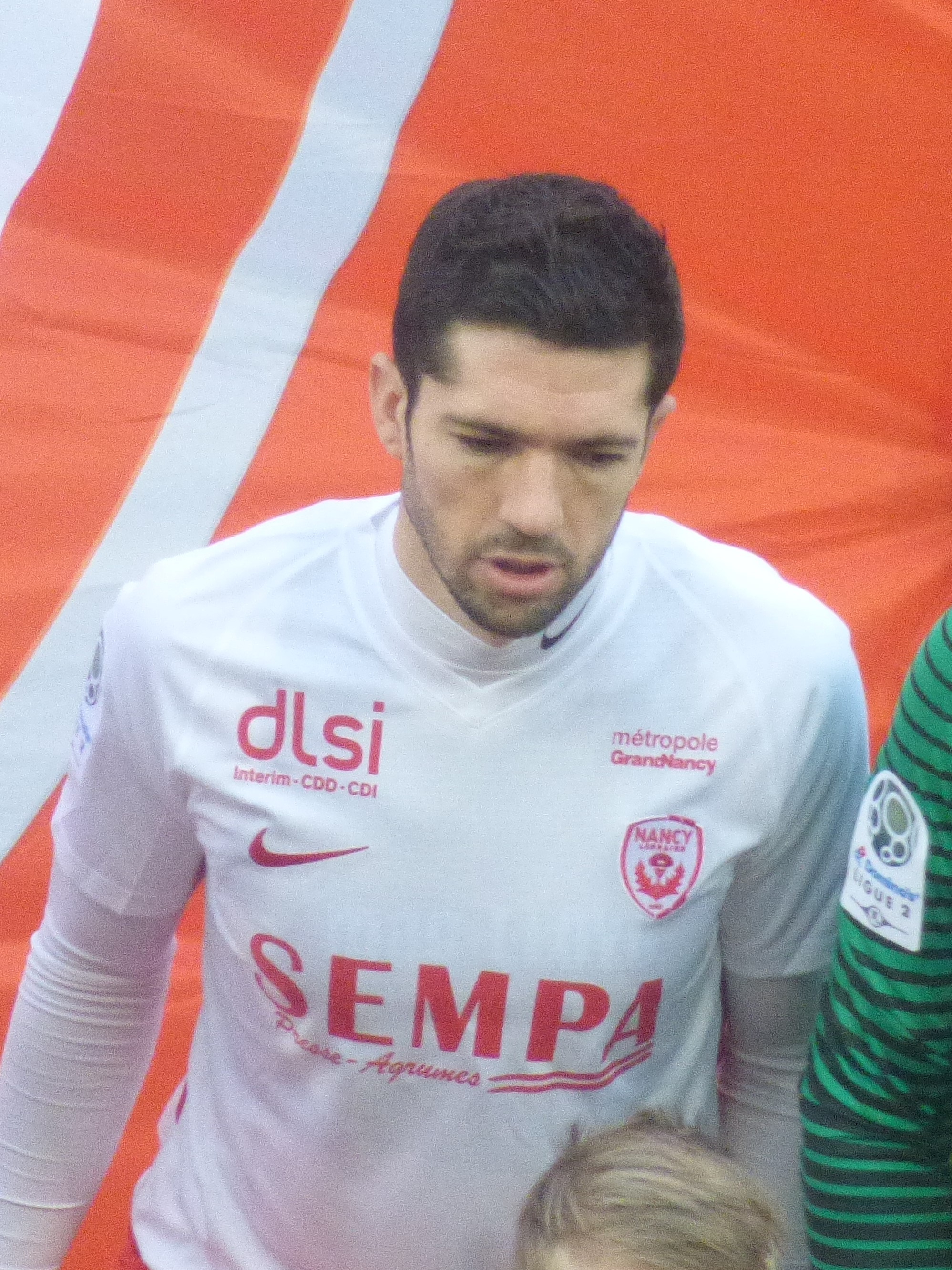 Vincent Muratori avant le match RC Lens / AS Nancy-Lorraine, comptant pour la vingt-et-unième journée du championnat de France de football de Ligue 2 2018-2019, le 19 janvier 2019, au Stade Bollaert-Delelis de Lens.